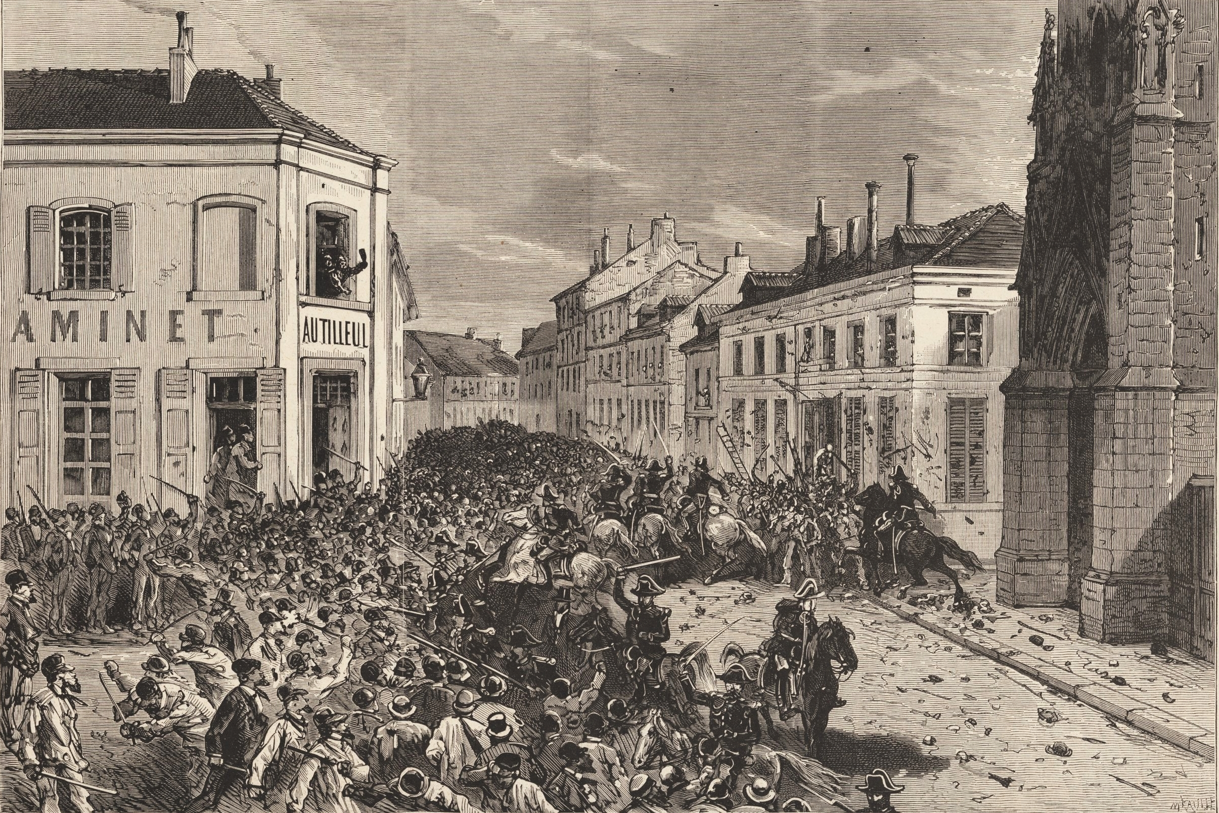 Troubles à Tourcoing : la gendarmerie disperse les émeutiers et dégage les abords du couvent des maristes dans la soirée du 8 novembre 1880.